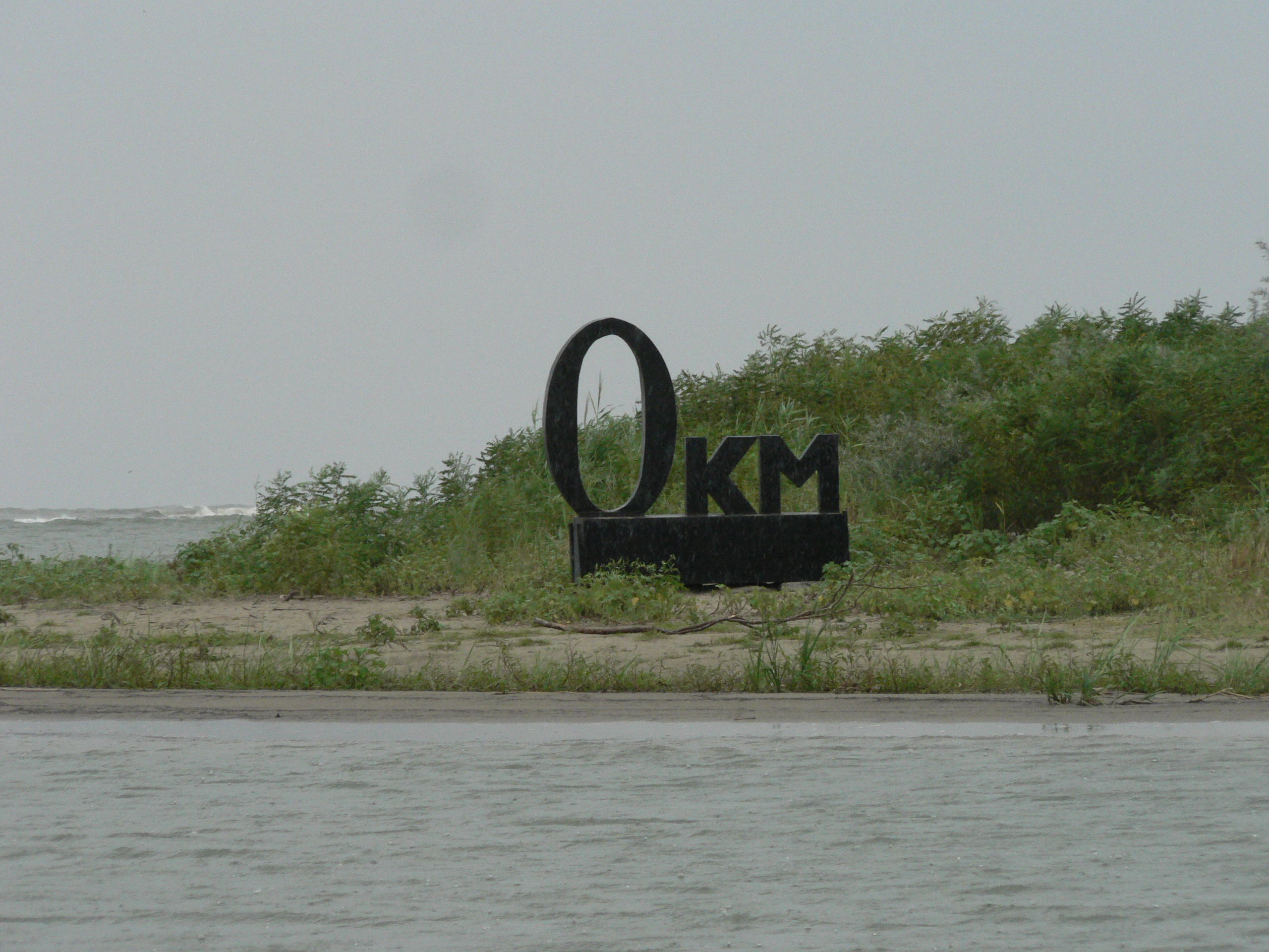 Нульовий кілометр у гирлі Дунаю. Кілійський р-н, м. Вилкове